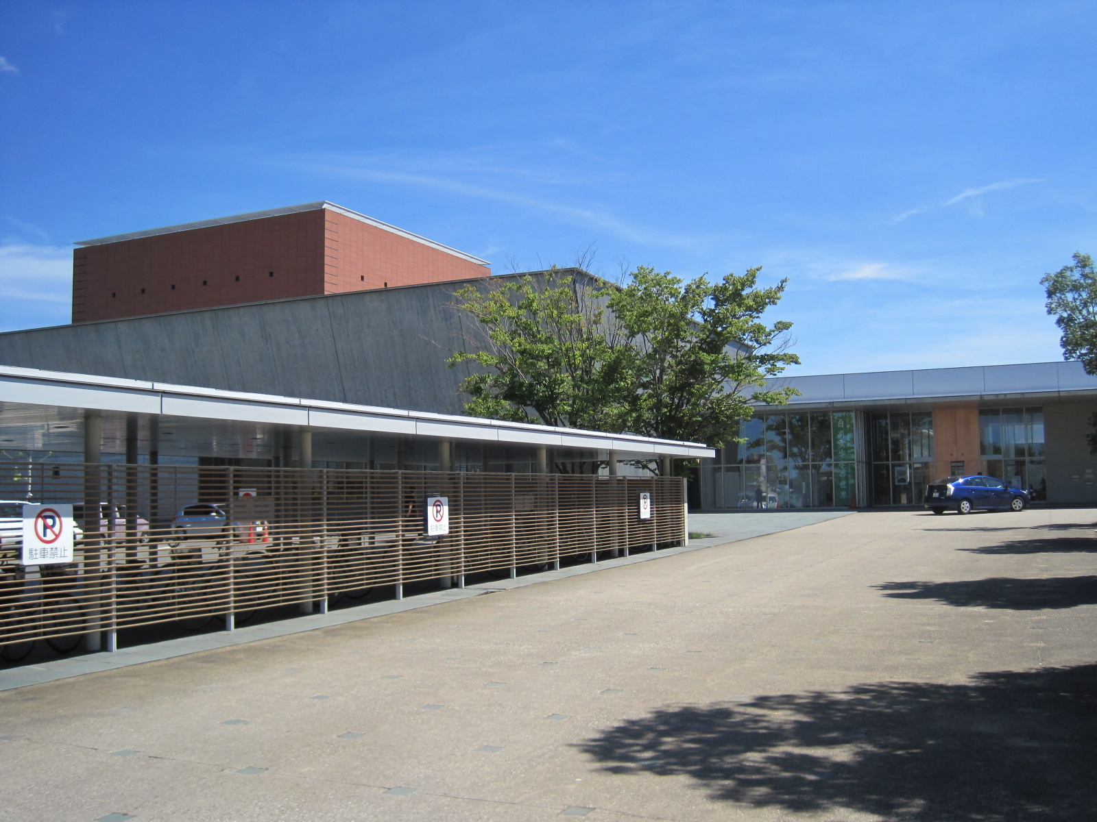 福井県立図書館・福井県文書館正面外観